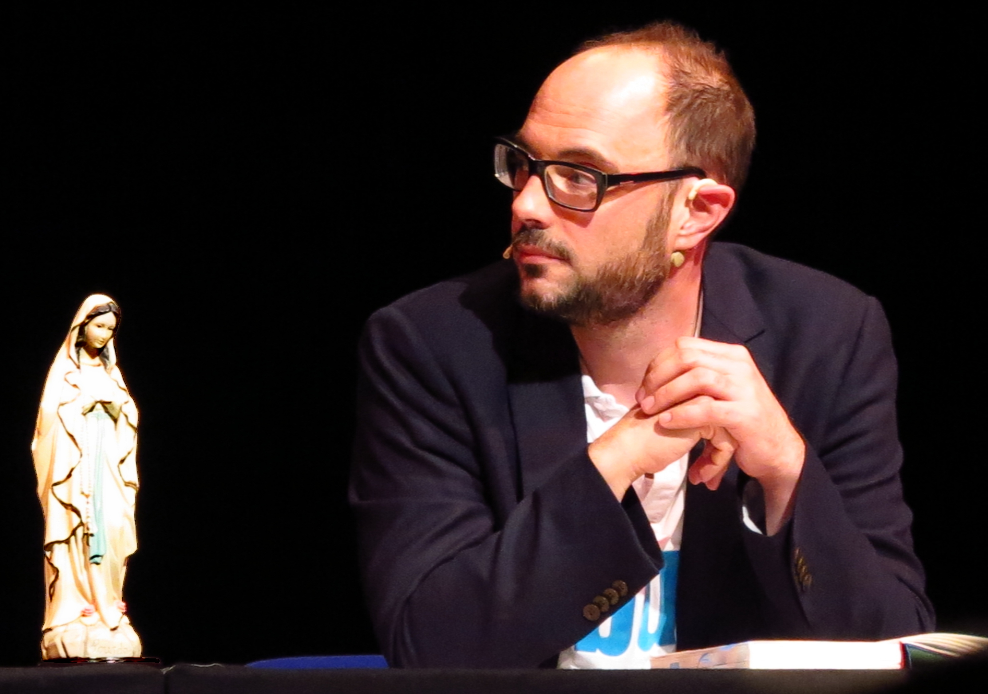 Der Allgäuer Schriftsteller Volker Klüpfl bei der Lesung "Schutzpatron" im "Veranstaltungsforum Fürstenfeld" in Fürstenfeldbruck im April 2012